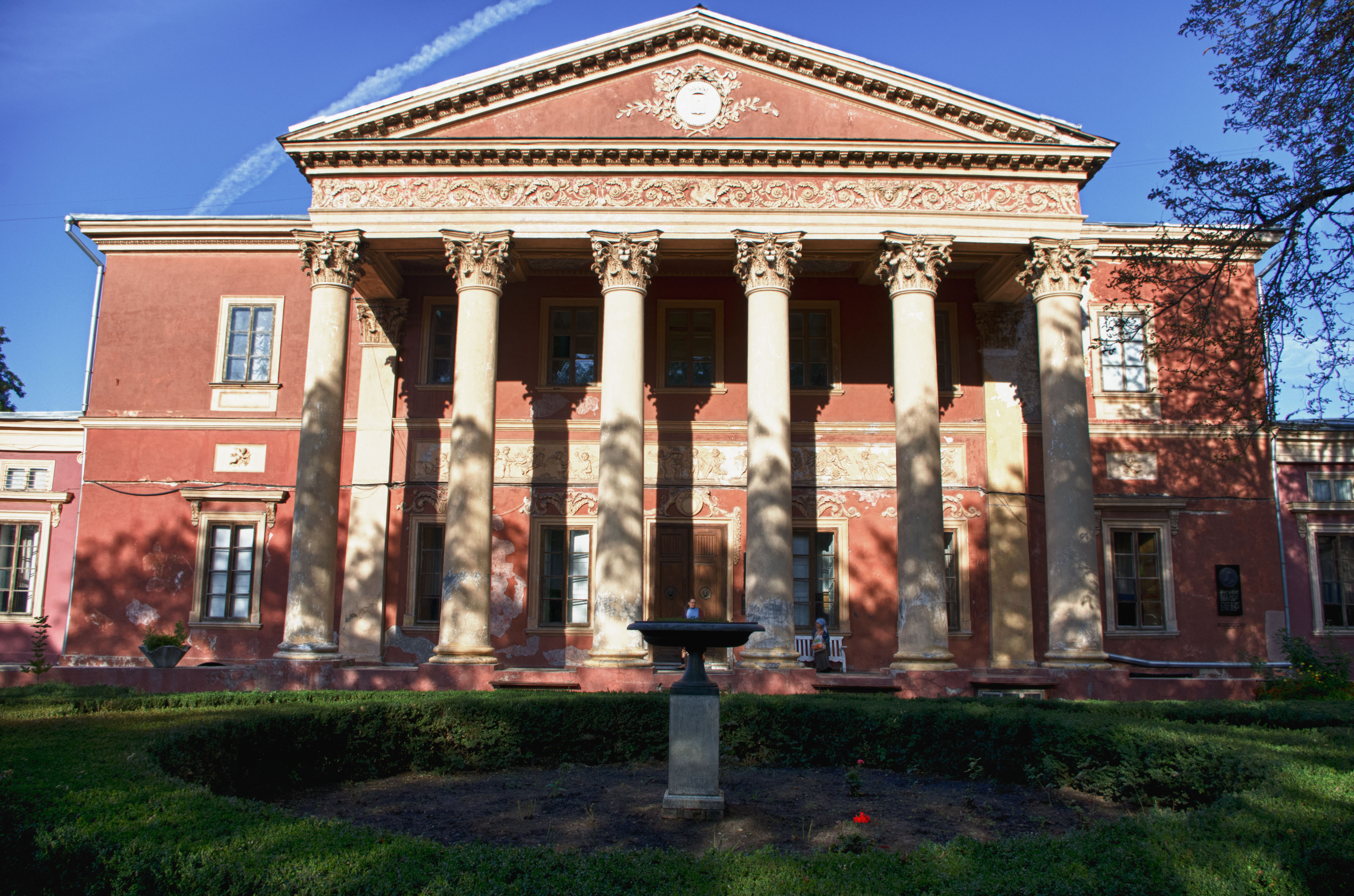 Палац Потоцького 1810 р., 1852 р